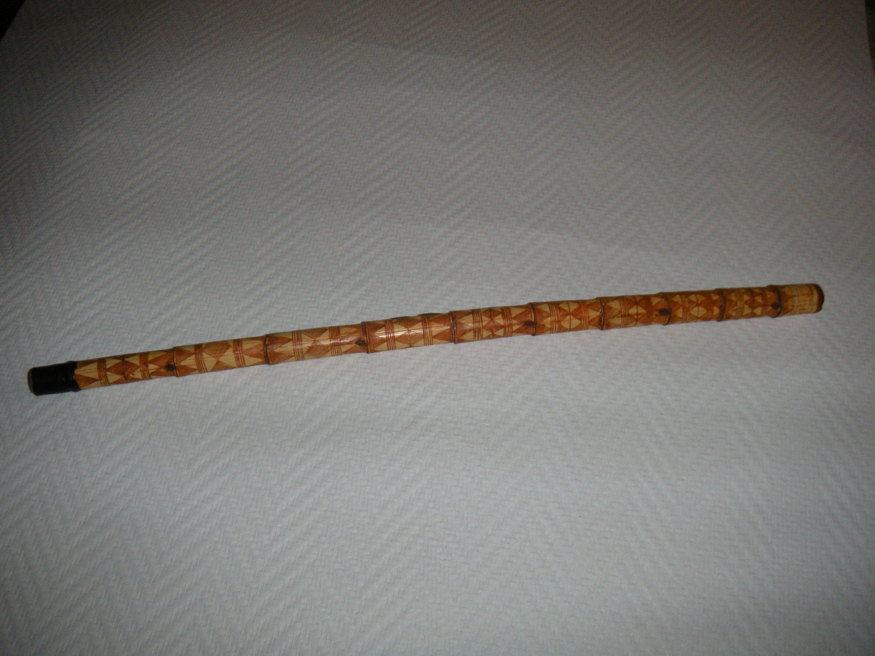 Flûte traditionnelle à bec des Chaouia des Aurès appelée Taghanimt ou taqsebt issue d'un roseau